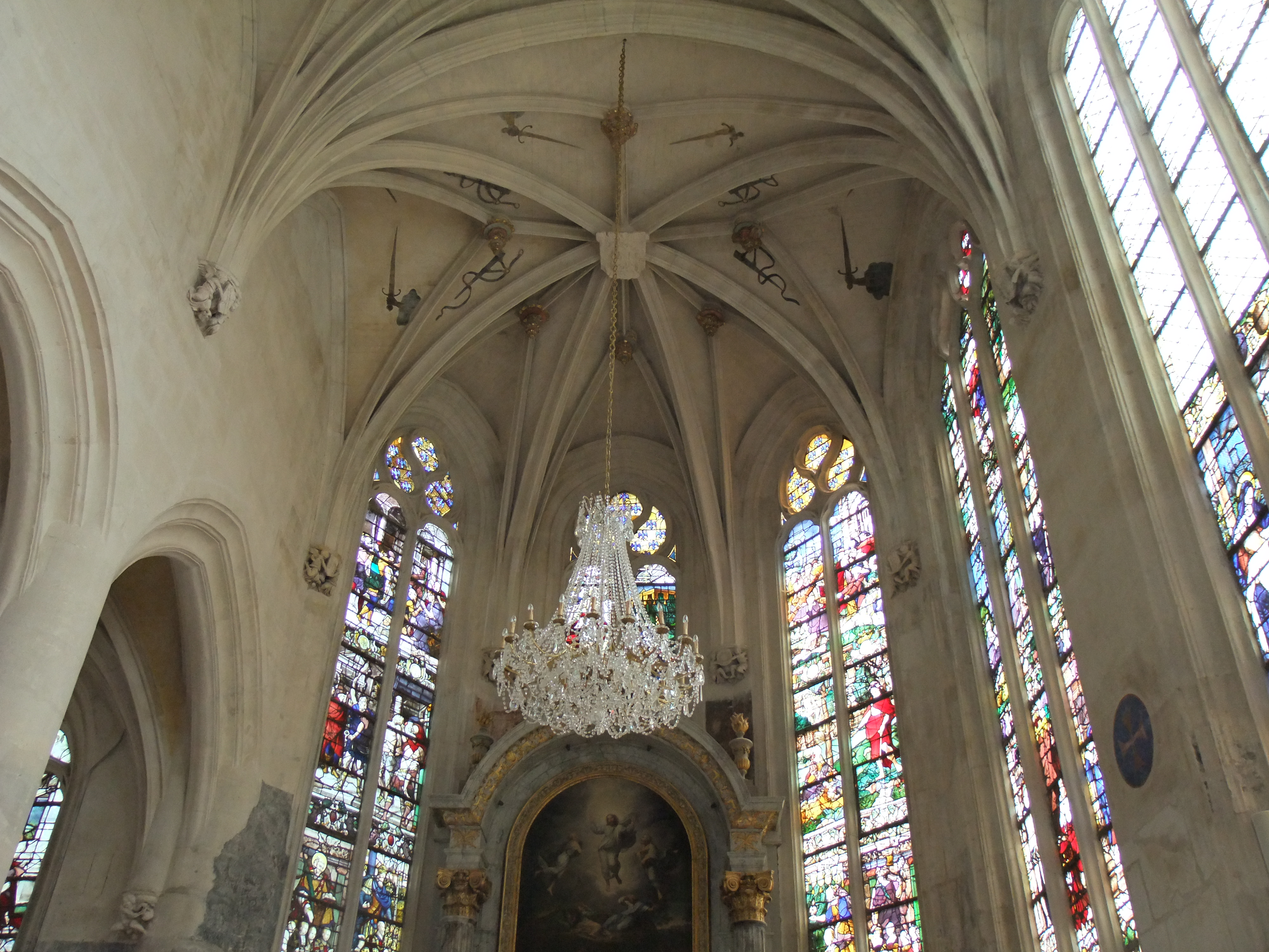 Vitraux de l'Eglise Saint Accuel à Ecouen.